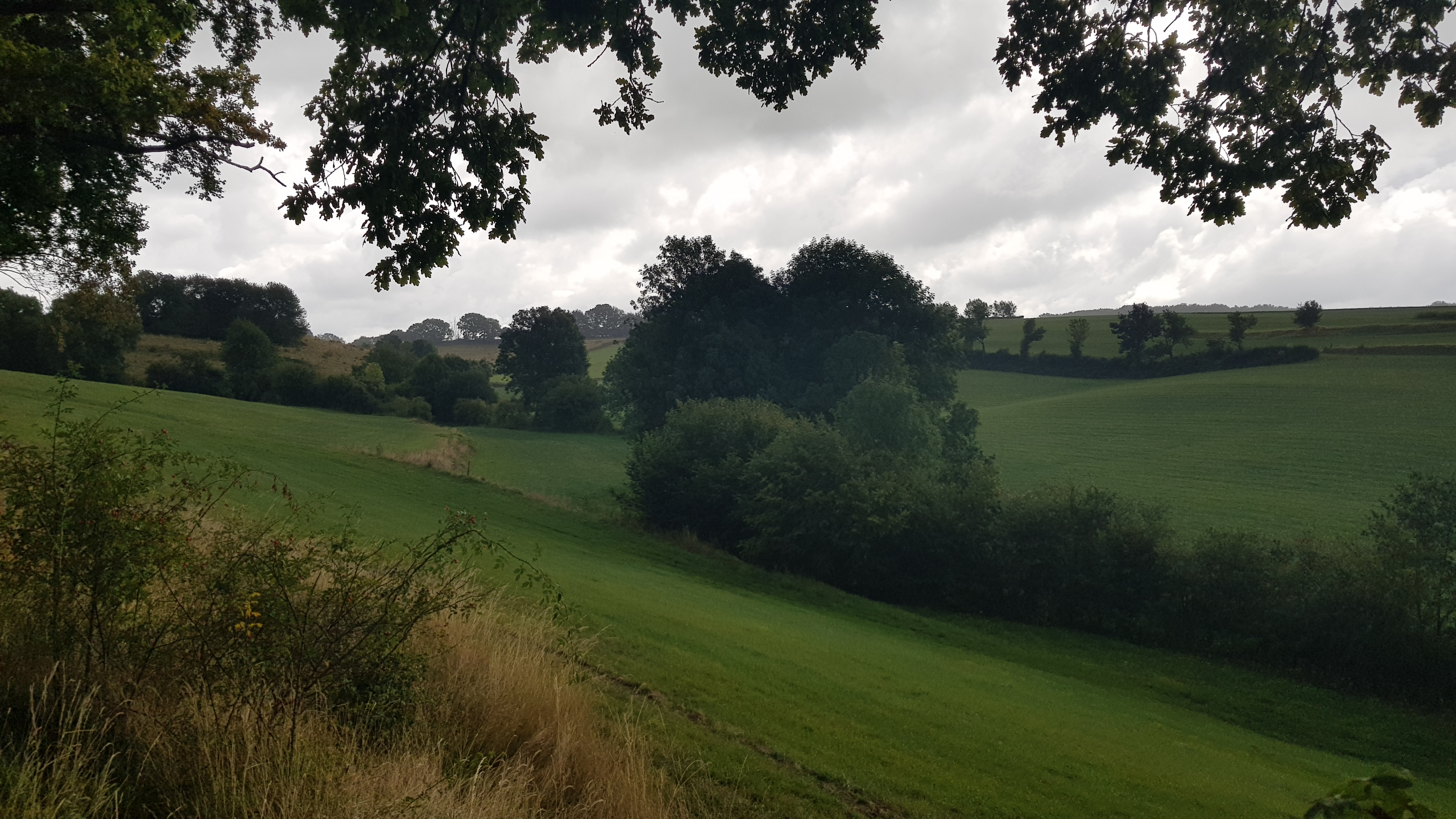 Elkenradergrub bij Elkenrade, Nederland